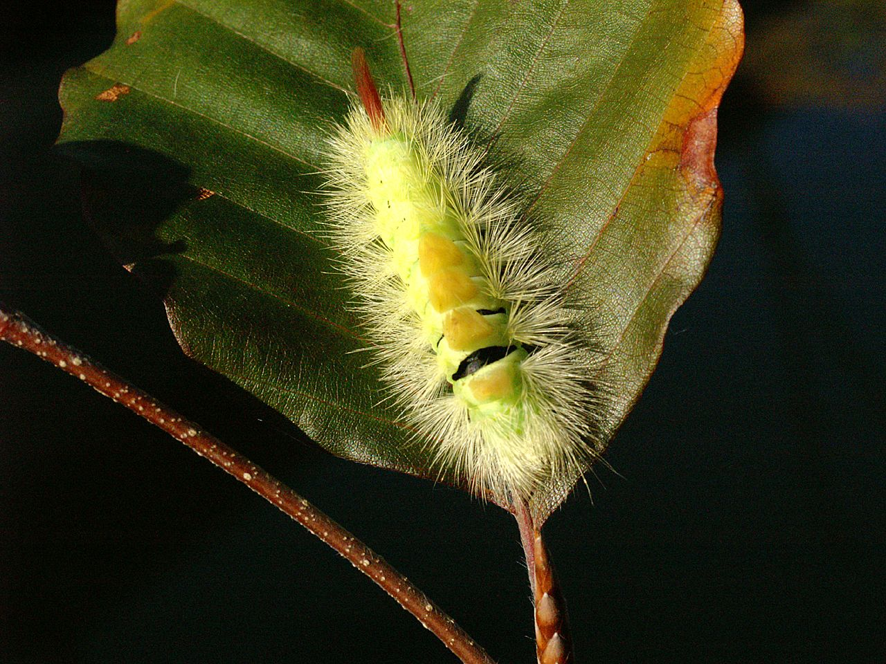 Calliteara pudibunda